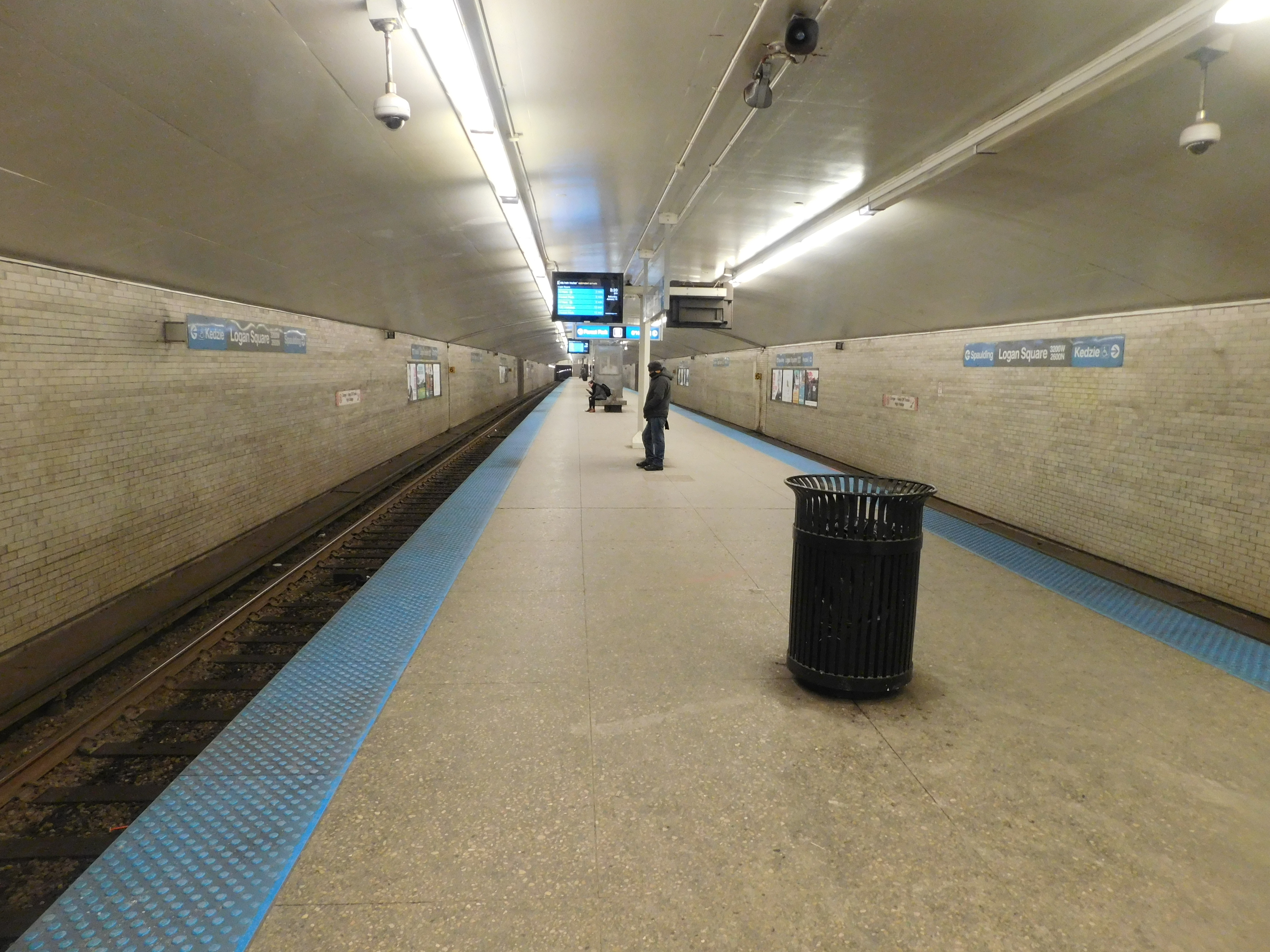 Chicago, Illinois